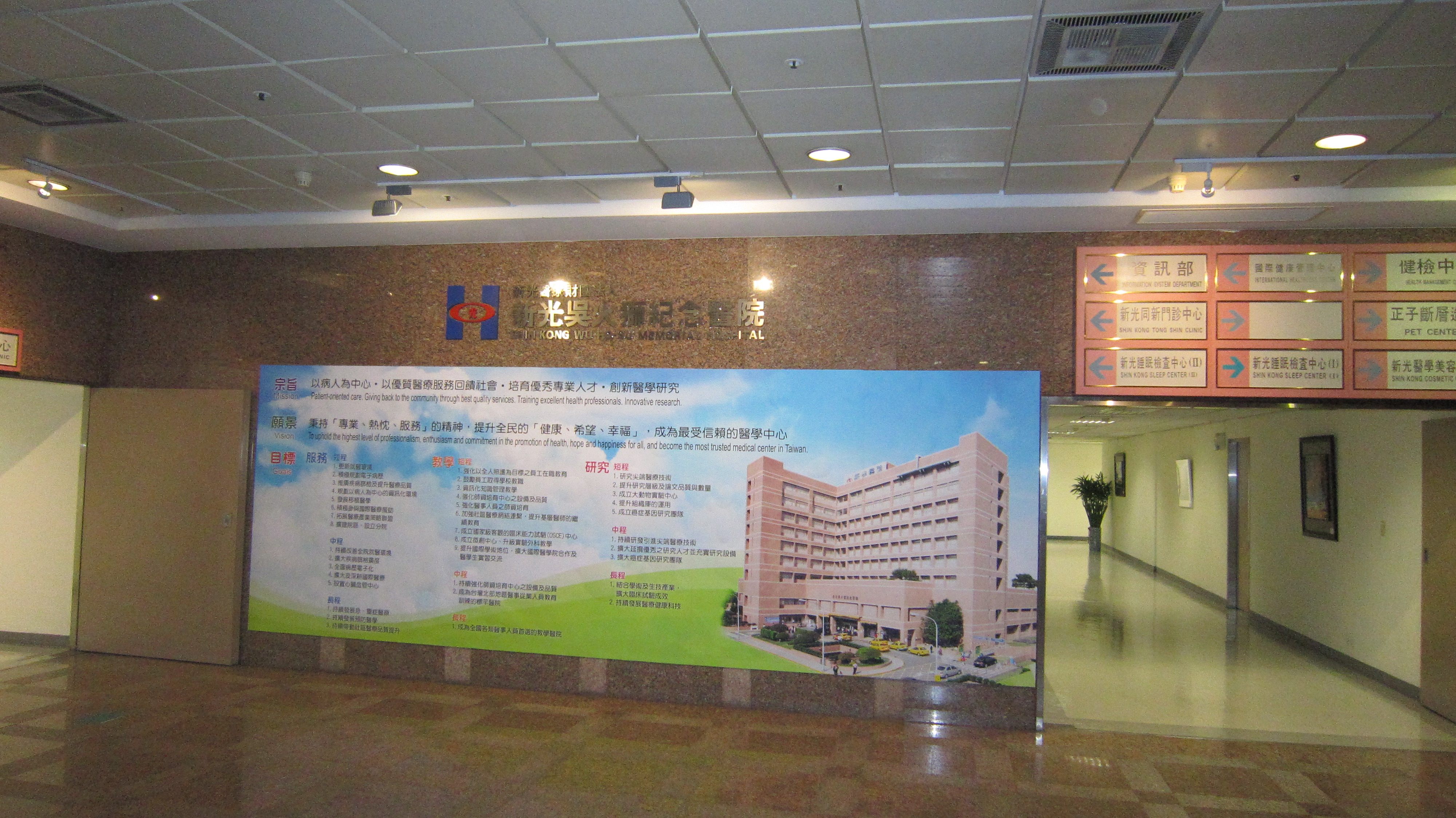 士林區新光醫院